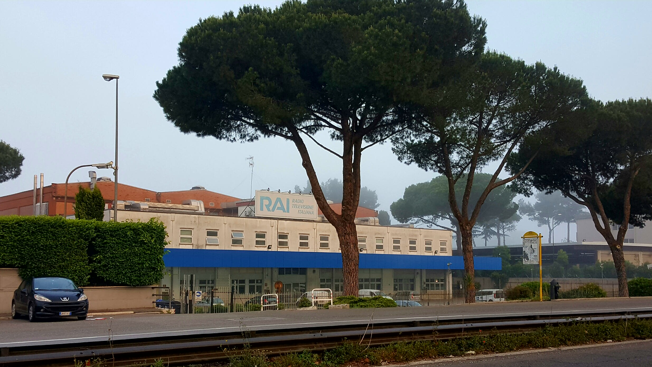 Sede Rai di via Salaria a Roma.